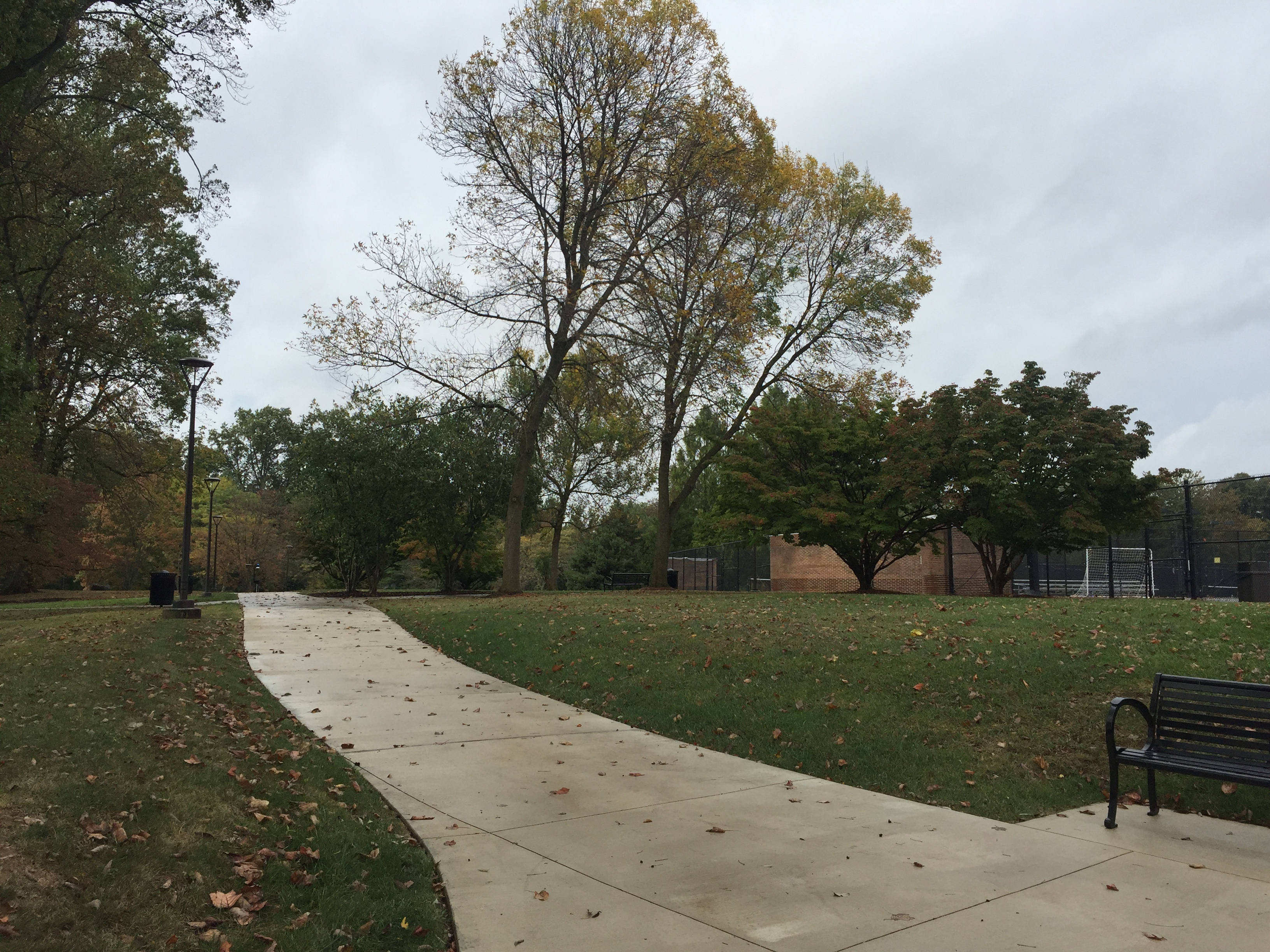 Campus